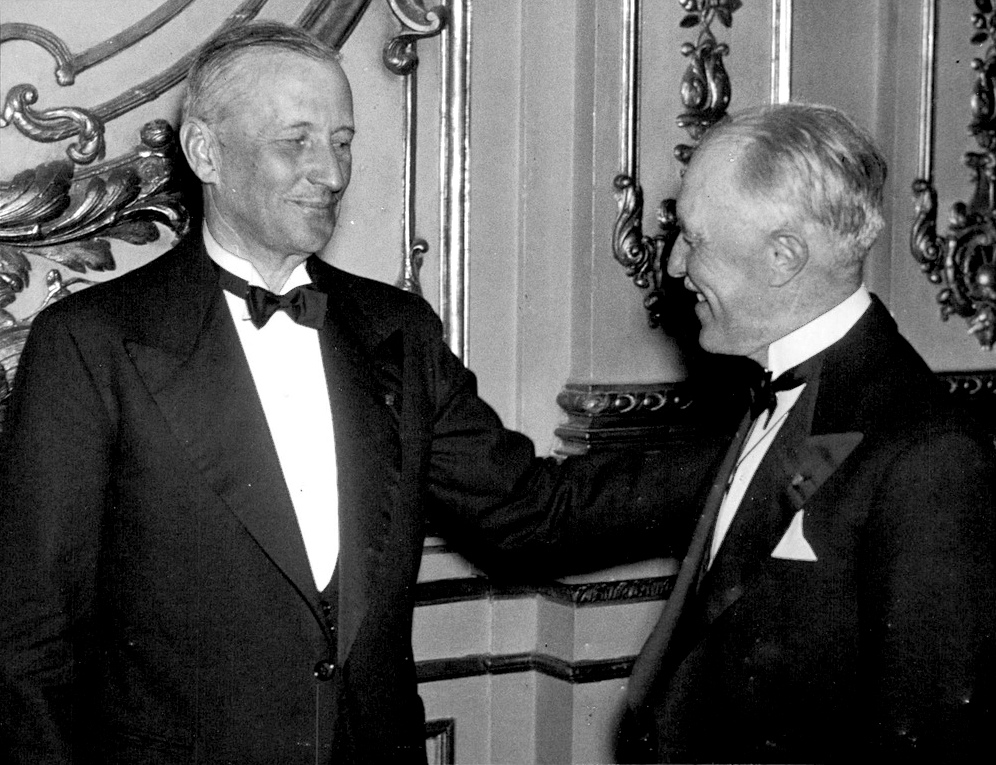 Den avgående ordföranden, generallöjtnant Nauckhoff, till vänster, och den nyvalde generalmajor Lindström, le fryntligt mot varandra.Sveriges landstormsföreningars centralförbund har på måndagen haft årsmöte i Stockholms borgarskolas föreläsningssal. Mötets förhandlingar leddes till en början av centralförbundets ordförande generallöjtnant Nauckhoff och därefter av hedersordföranden prins Carl. Till mötet hade överstyrelsens ledamöter och cirka 300 ombud från förbund samt manliga och kvinnliga föreningar. Bland de närvarande märktes generallöjtnanterna Thörnell och P. Sylvan, landshövding Lübeck, generalmajorerna von der Lancken, Hanngren, Malmberg, Cederschiöld och Lindström, Landstormskvinnorådets ordförande och vice ordförande generalskan M. Schmidt och fru T. Wadner. Under dagen har även centralförbundets överstyrelse sammanträtt, och landstormskvinnoföreningarnas ombud ha samlats till ordinarie landstormskvinnomöte.